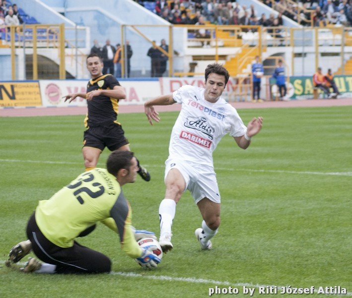 Imagine din meciul Gloria Bistrita - FC Brasov (0-0)